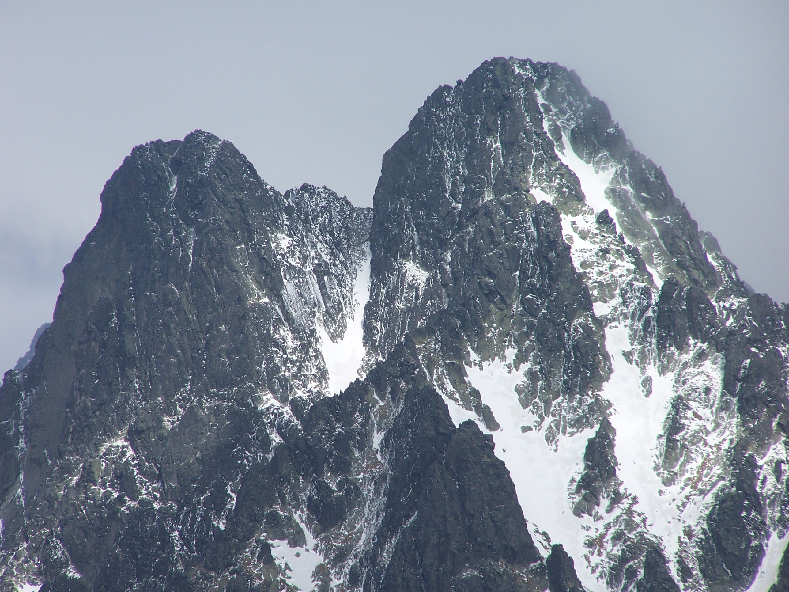 Szczyty Pośredniej Grani, widok z podejścia na Sławkowski Wierch